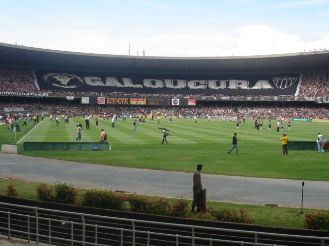 Torcida Galoucura